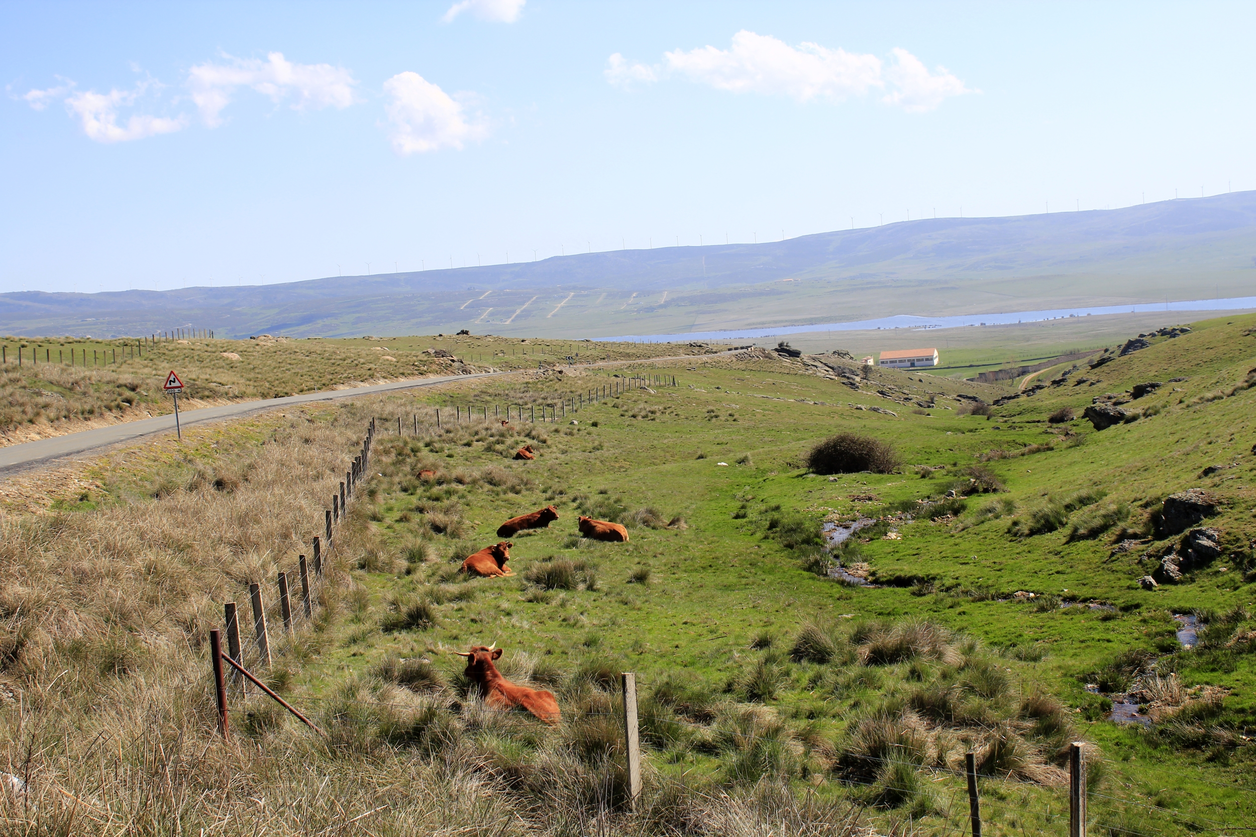 Vacas en la provincia de Ávila, Castilla y León, España. Al fondo el Embalse de Serones en el río Voltoya.